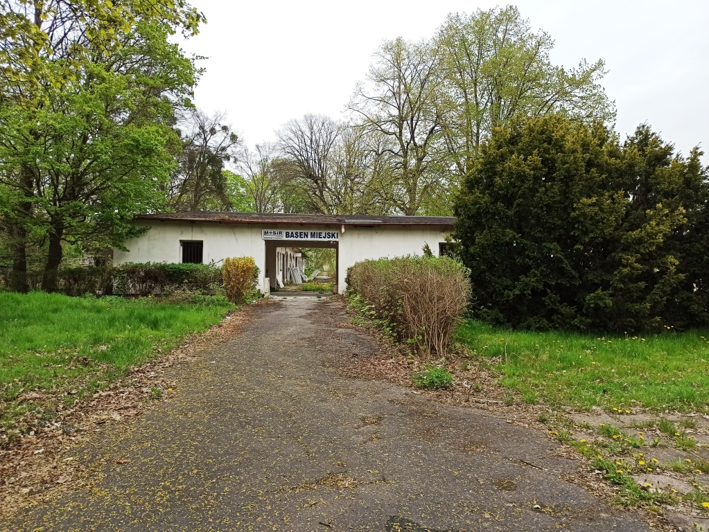 Elbląg basen odkryty 1934, ruina rok 2020